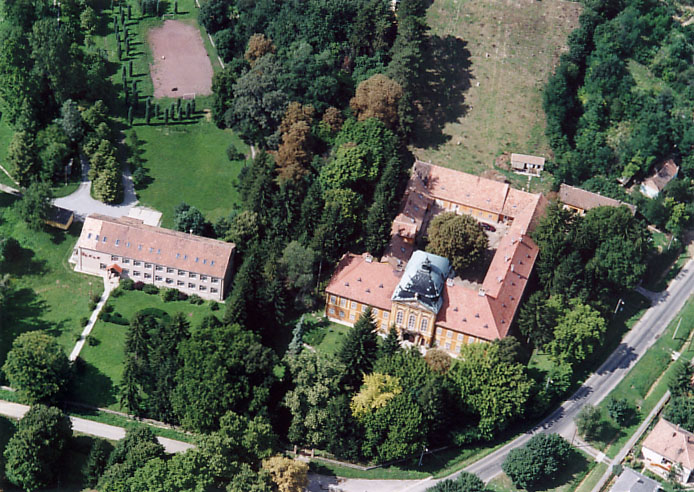 Palace - Megyefa (Bükkösd) - Hungary - Europe (Jeszenszky Mansion)